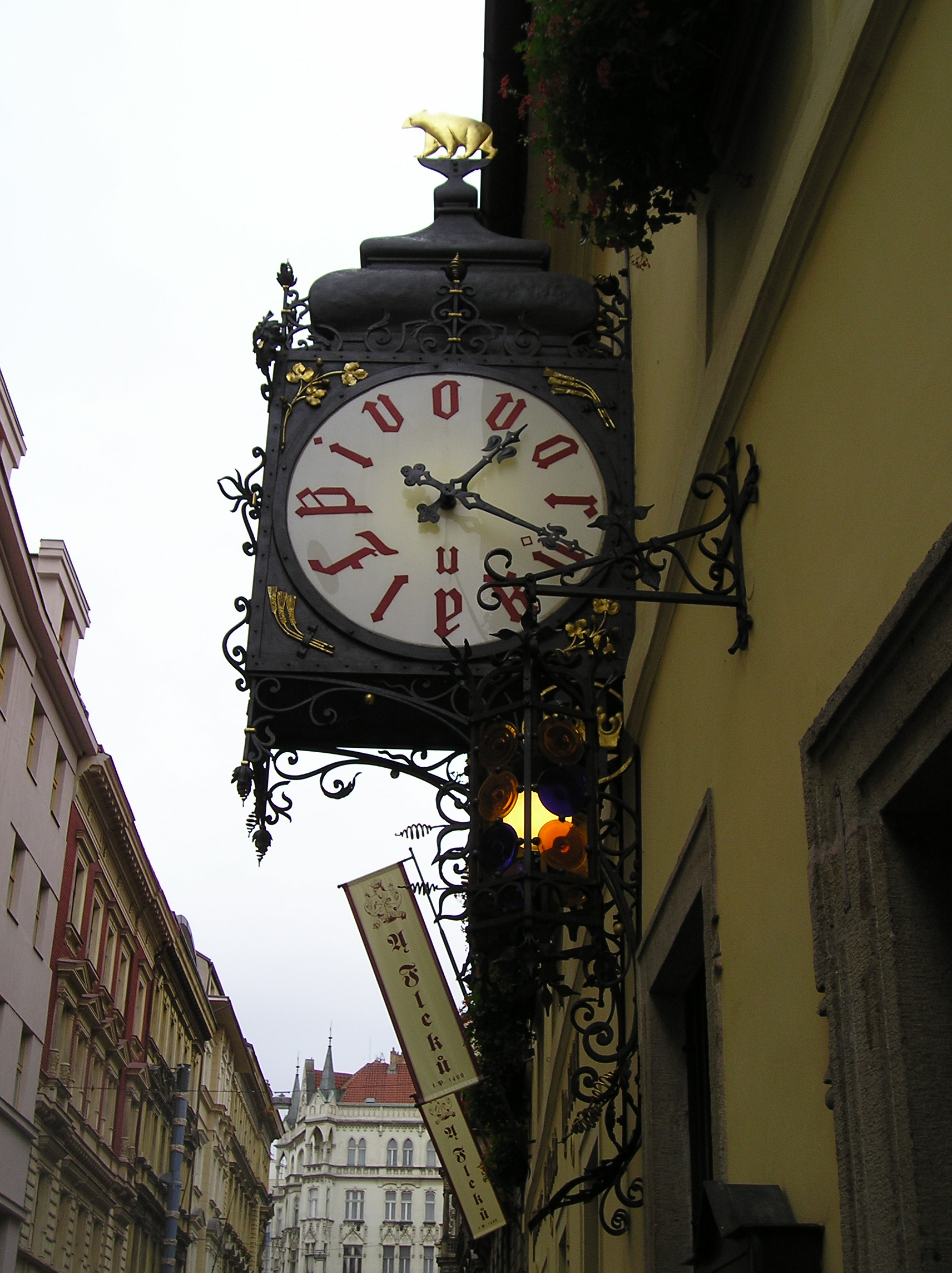 Praag - Pivovar U Fleků